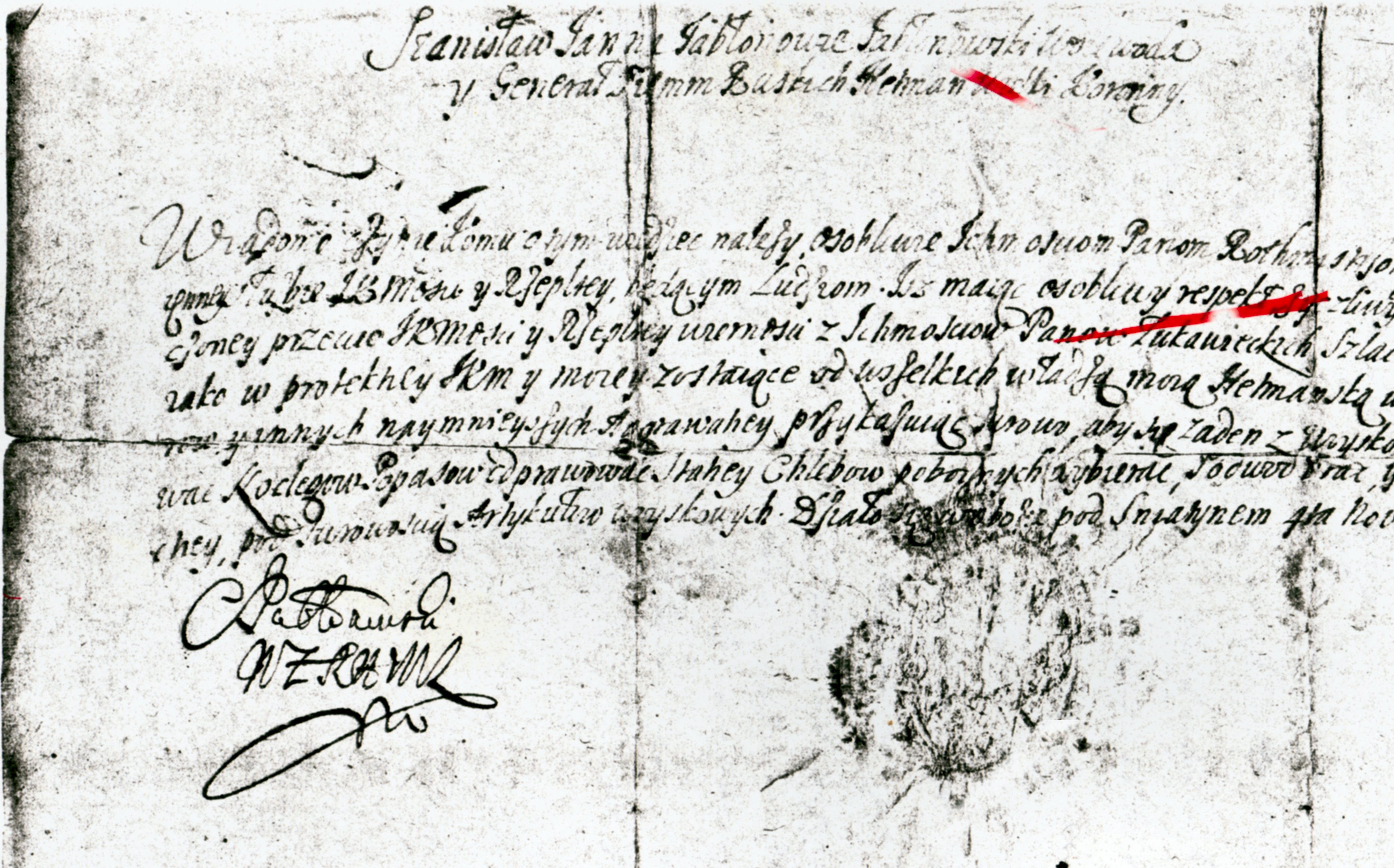 Freistellungsurkunde von 4. November 1691 durch General Graf Jablonowski, Großhetman der Krone des Königreichs Polen